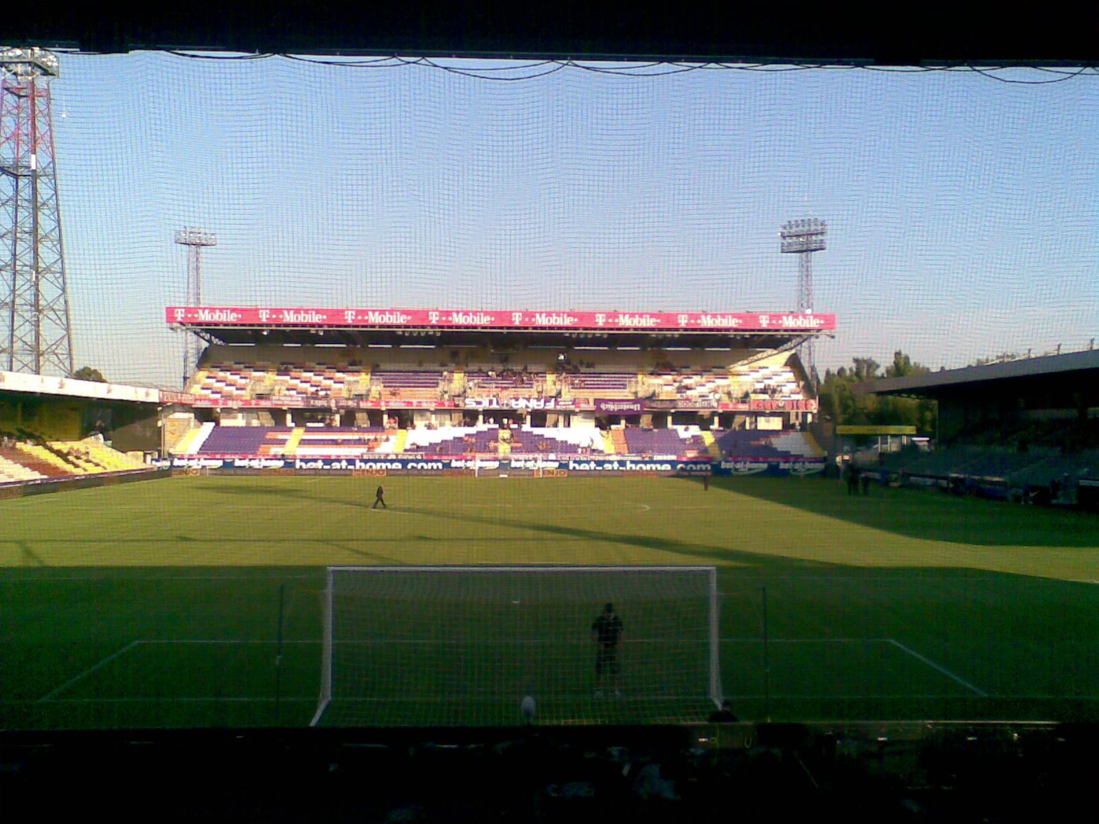 Die neue Osttribüne des Horr Stadions